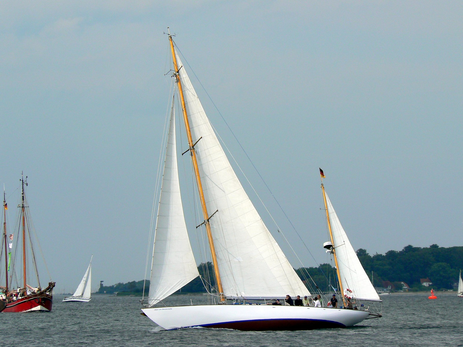 Segelyacht (Yawl) Peter von Seestermühe auf der Kieler Förde. Gebaut 1936 in Danzig, alter Name: Peter von Danzig.